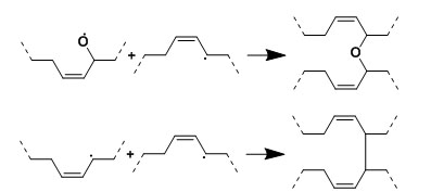 Hærdning af oxidativt tørrende olier 2